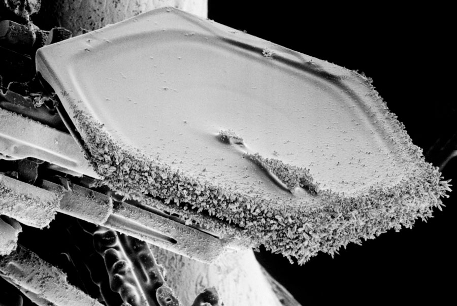 Flocon de Neige, Cristal hexagonal Depuis Photo par MEB.